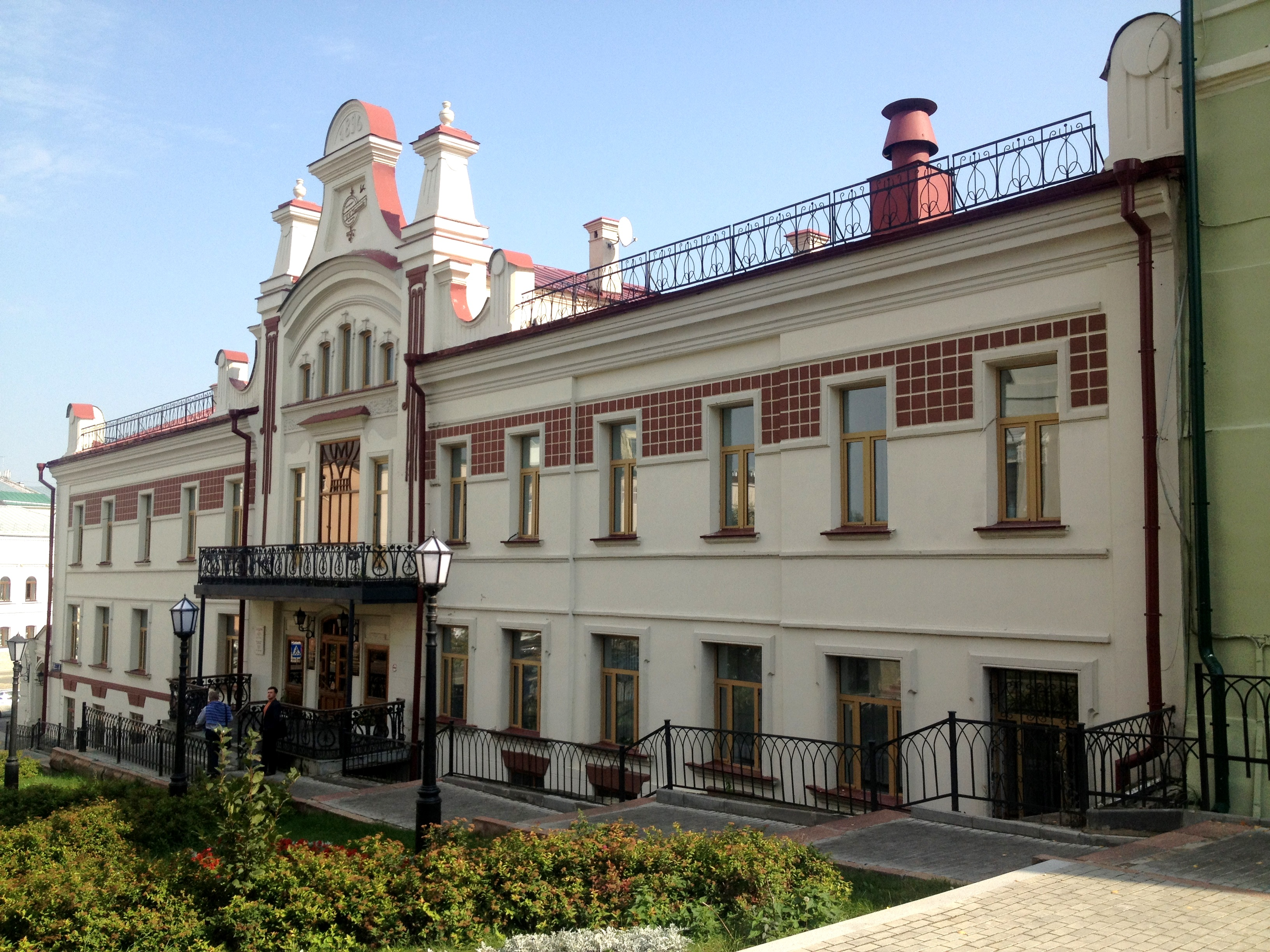 Здание типографии Харитонова: улица Миславского, 4, Казань, Татарстан